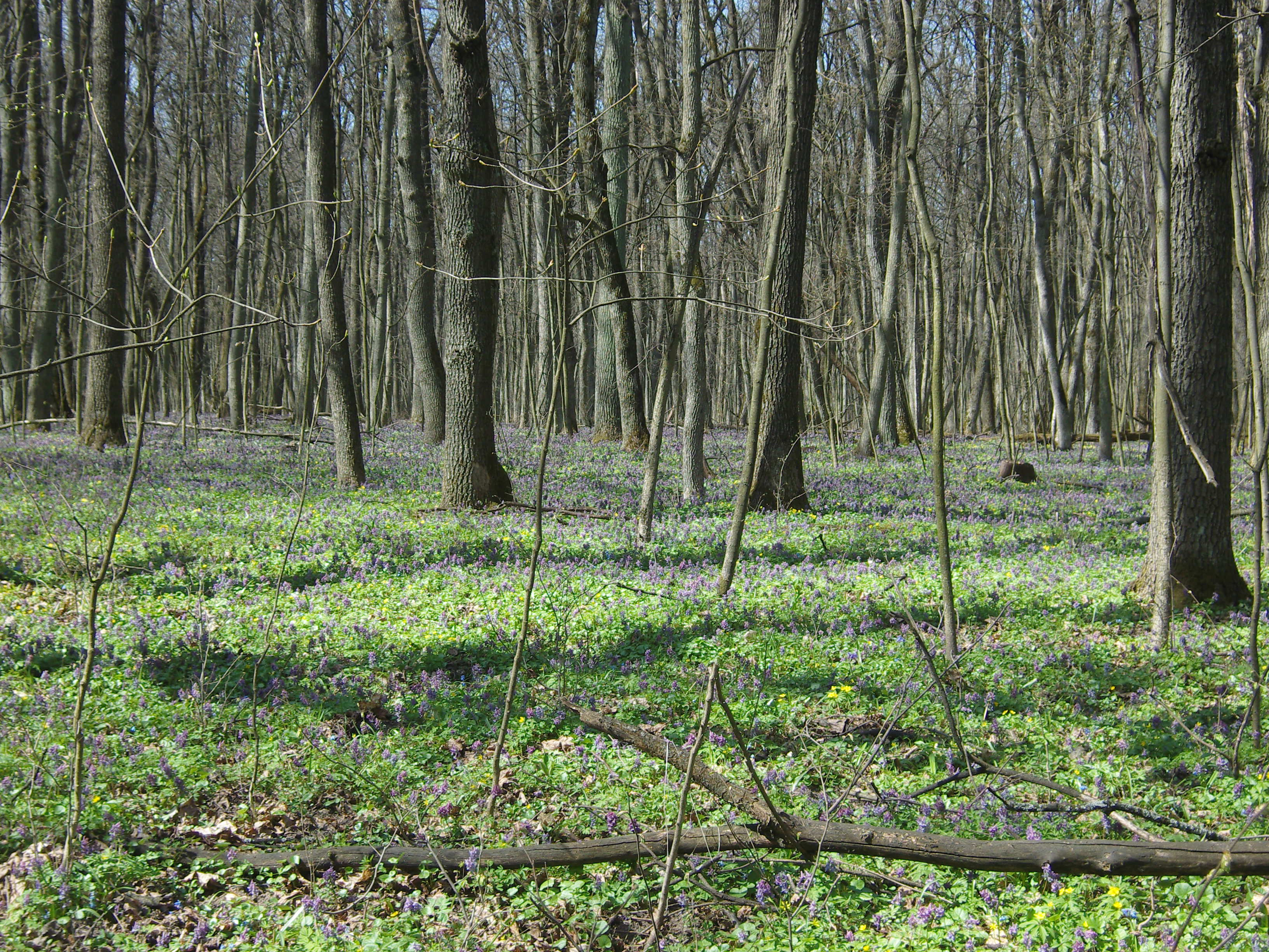 Лес на Ворскле.